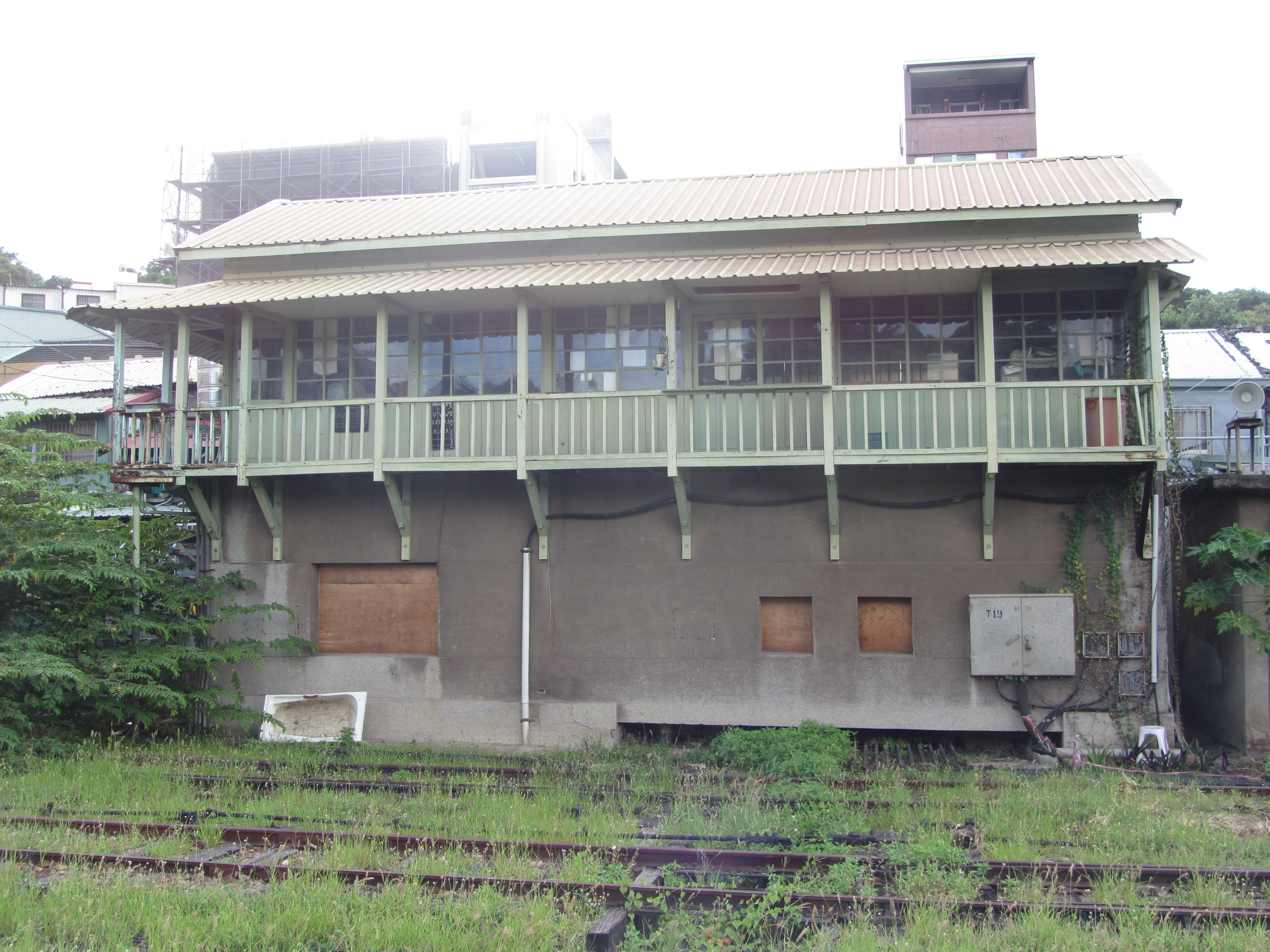 高雄港車站北號誌樓。